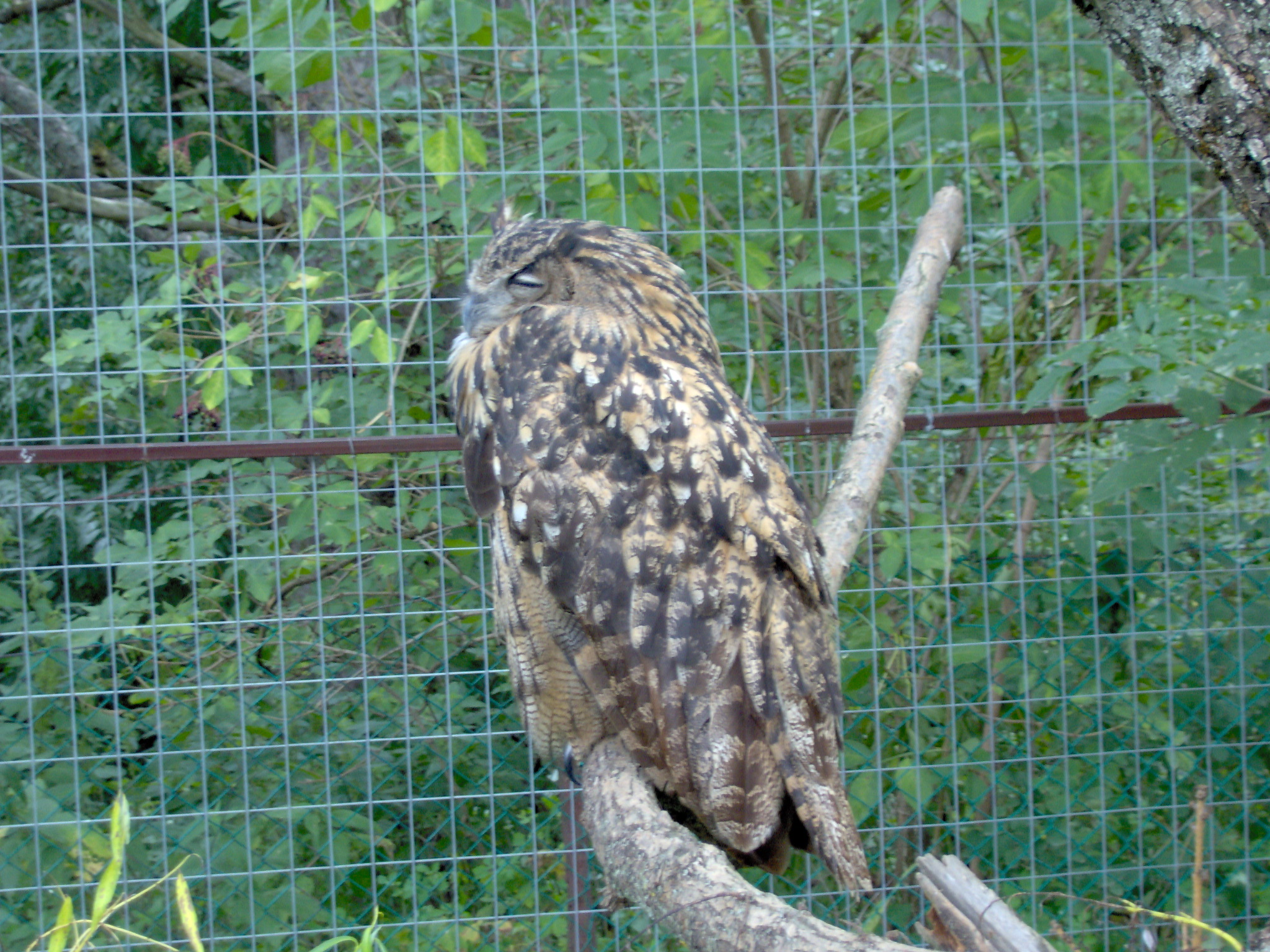 Bubo Bubo